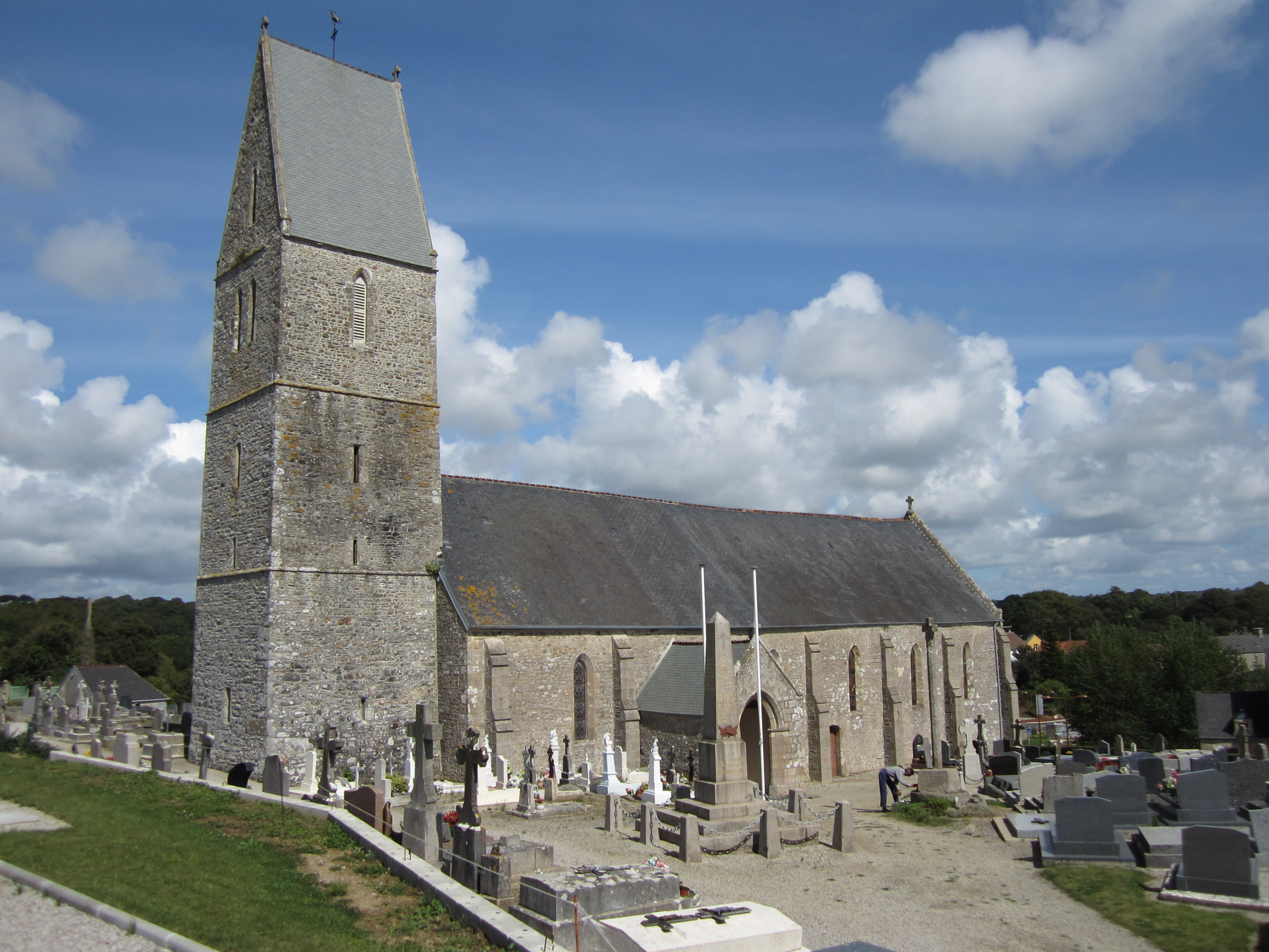 Église Notre-Dame de Pierreville (Manche)